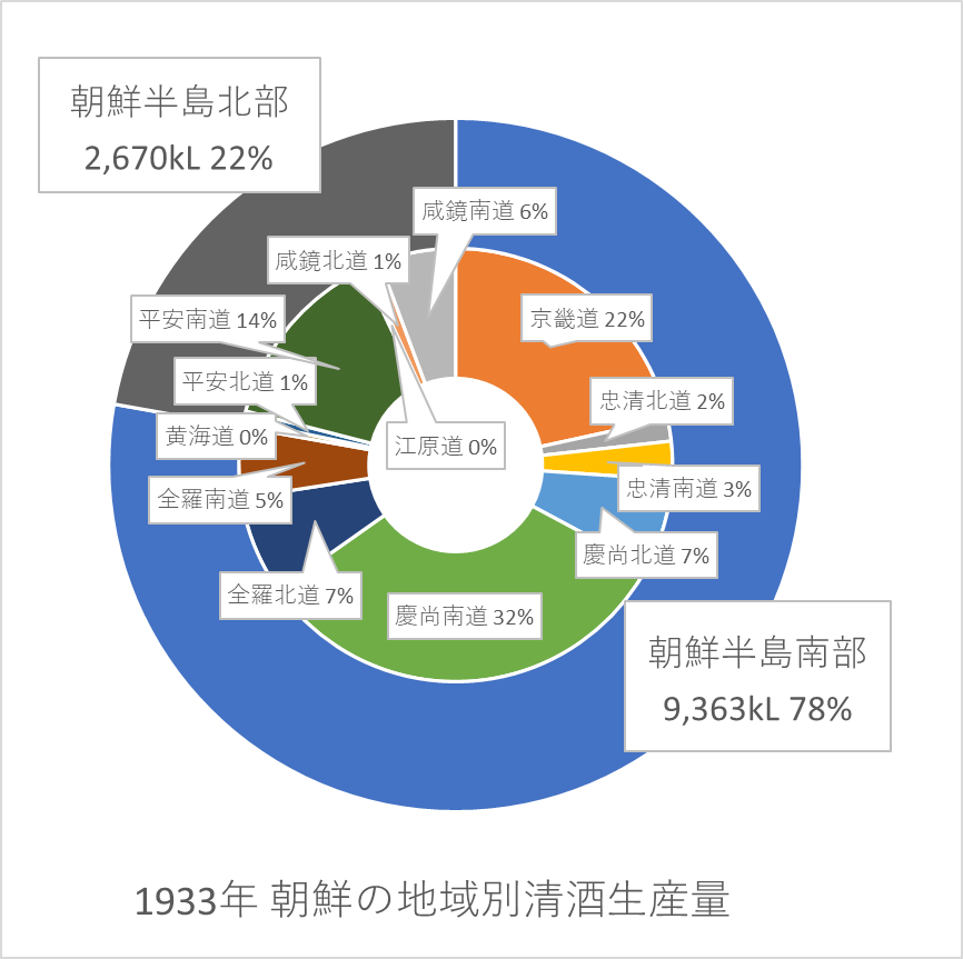 戦前期朝鮮・台湾における邦人の酒造業の展開 をもとにExcelで作成。